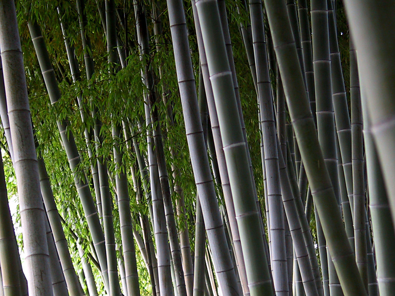 bamboo maze